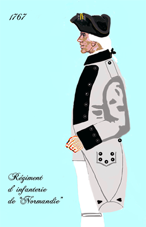 Uniform des königlich französischen Infanterie-Regiments Nr. 5 „Normandie“ 1767. - Entnommen und überarbeitet aus: „LES UNIFORMES ET LES DRAPEAUX DE L'ARMÉE DU ROI“ Marseille 1899. (L'uniforme du 5e régiment française d'infanterie royale „Normandie“ en 1767